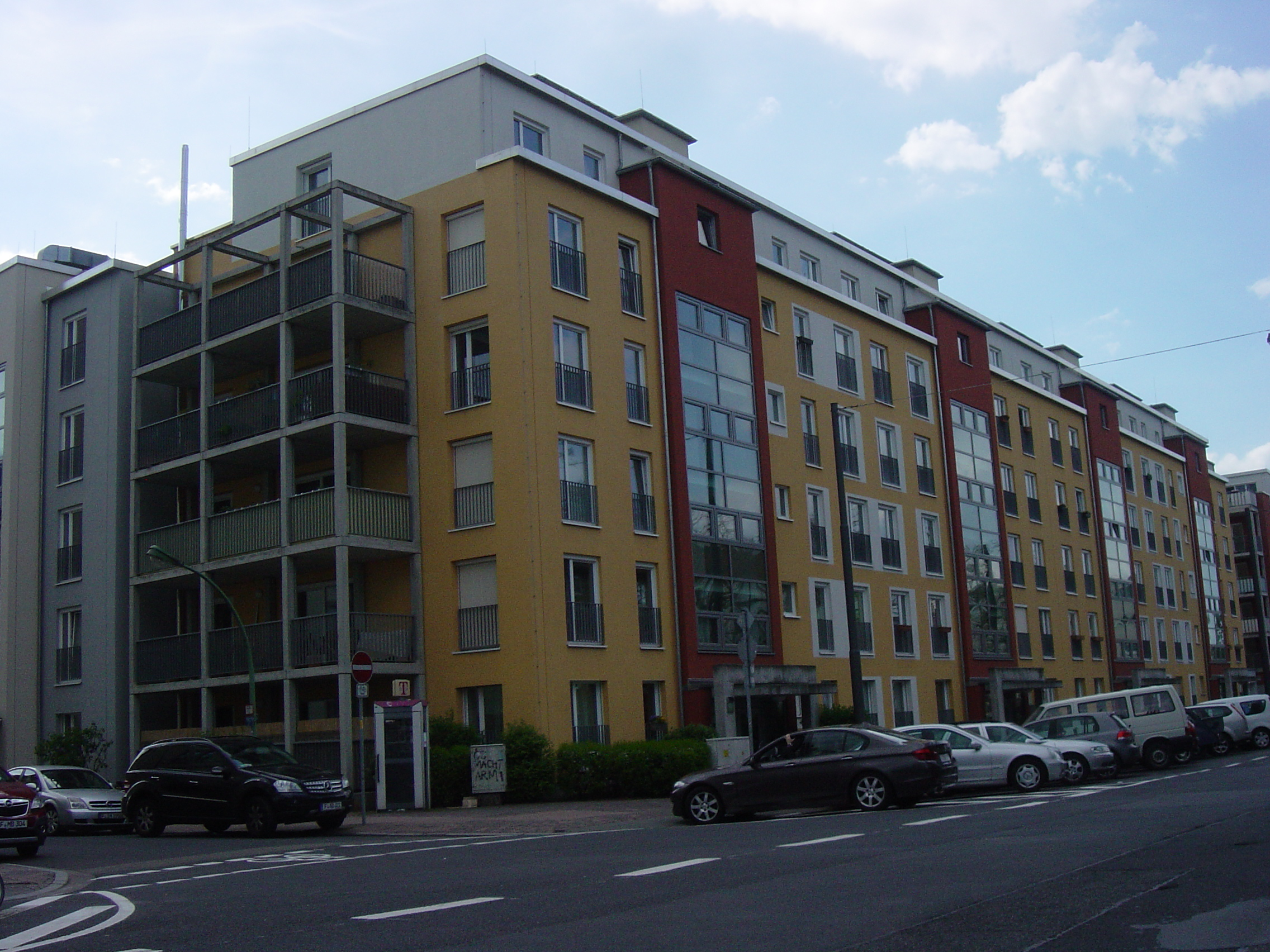 Frankfurt-Bockenheim Passivhaus-Komplex Sophienhof; Im Geviert Ginnheimer Landstraße, Sophienstraße, Konrad-Broßwitz-Straße (damals Werder-Straße) entstand von 1877 bis 1879 ein Militärlazarett für 109 Kranke, später wurde es von der Polizei, bzw. Bereitschaftspolizei, benutzt. Auf der Seite der Konrad-Broßwitz-Straße wurde in der Zeit des Zweiten Weltkriegs ein Luftschutzbunker errichtet, der nach dem Krieg teilweise als Wohnheim benutzt wurde. Von 2005 bis 2006 errichtete die städtische Frankfurter Aufbau AG hier mit 15 Mehrfamilienhäusern mit 149 Miet- und Eigentumswohnungen, sowie ca. 1000 m² Gewerbeeinheiten einen viel beachteten Gebäudekomplex, der bis dato größte Passivhaus-Komplex in Europa, den sogenannten Sophienhof. Die Frankfurter Aufbau AG gehört wie die HELLERHOF GmbH, die WOHNHEIM GmbH, die MIBAU GmbH und die SAALBAU Betriebsgesellschaft mbH zur ABG FRANKFURT HOLDING GmbH.